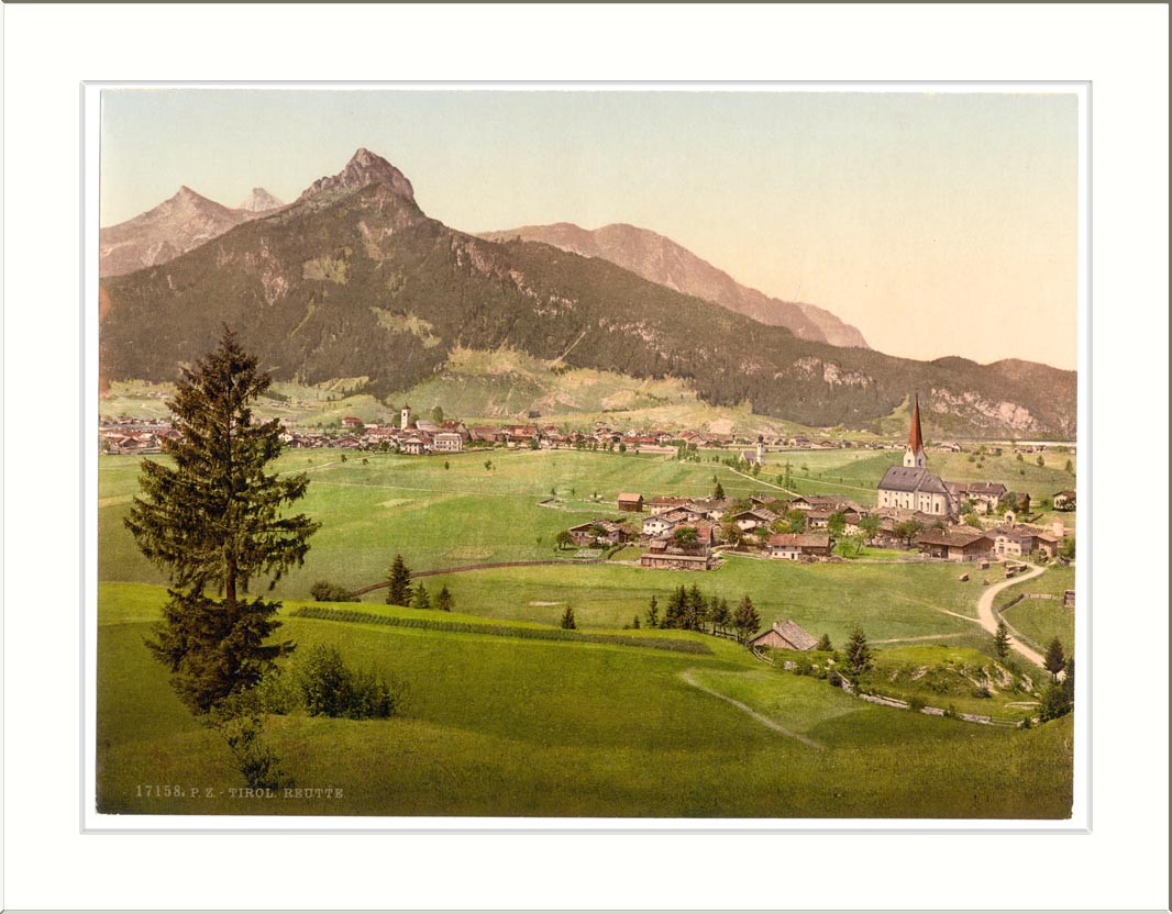 Reutte general view Tyrol Austro-Hungary